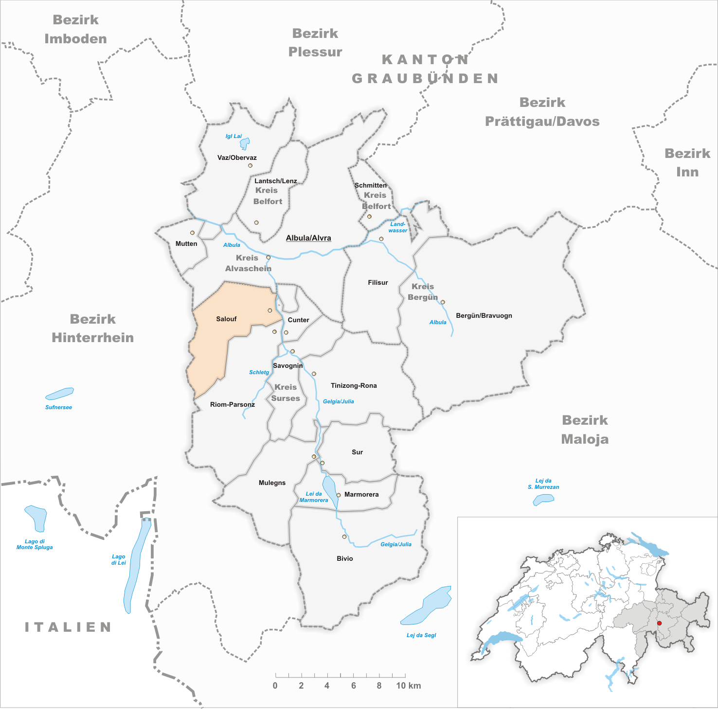 Municipality Salouf